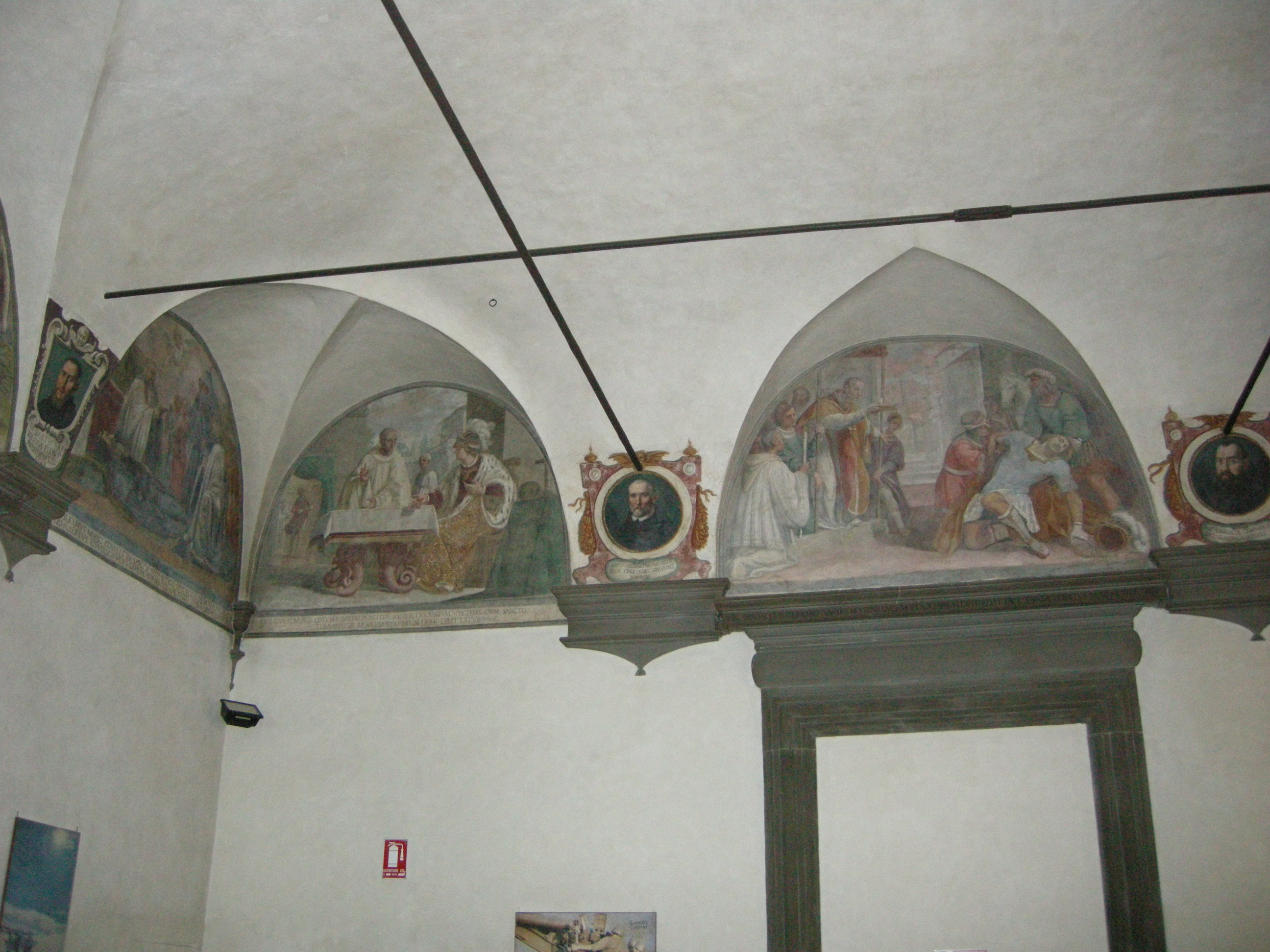 Santo spirito, chiostri, sala lunette